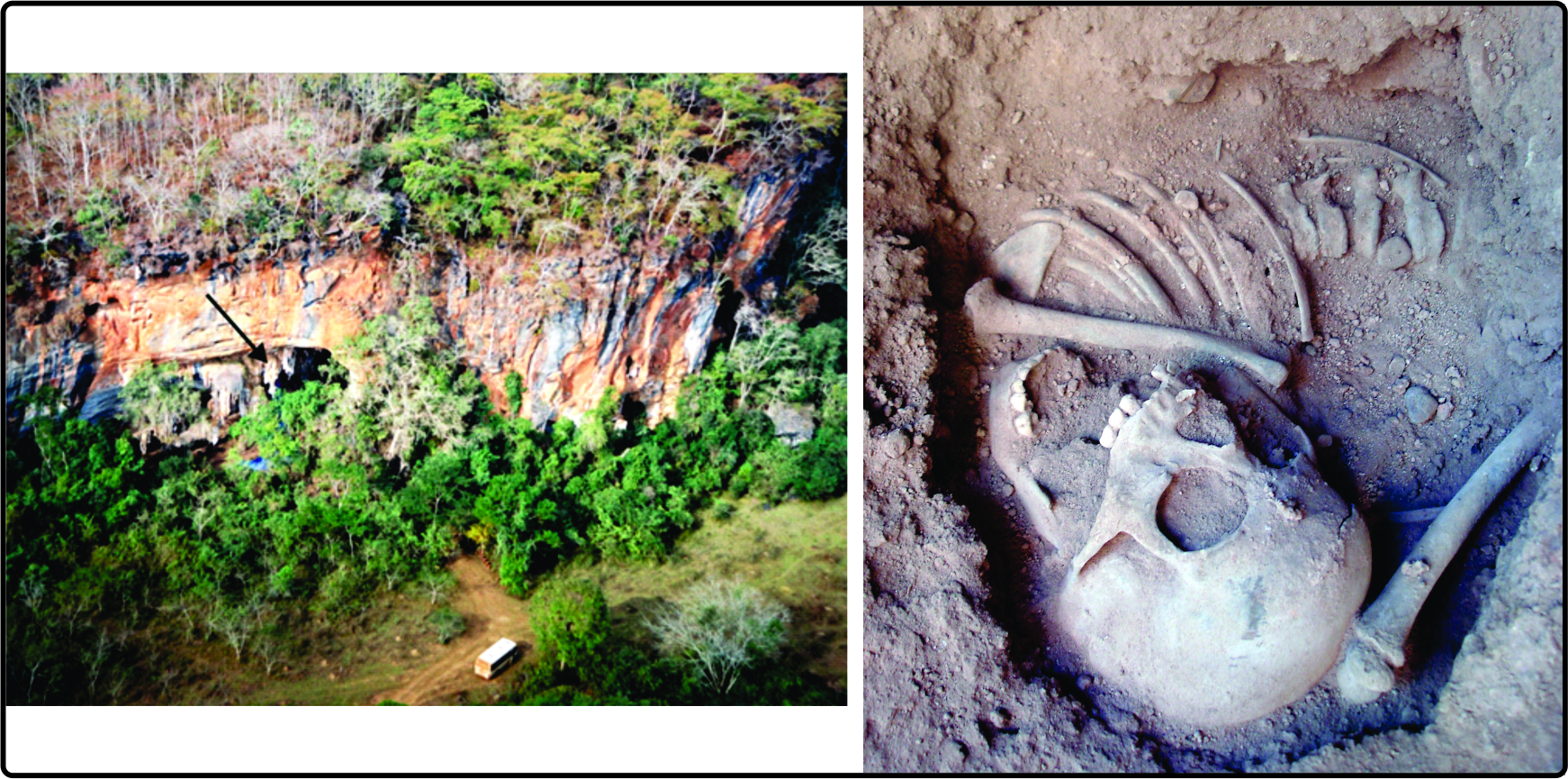 Lapa do Santo - Vista aérea do maciço e esqueleto humano de cinco anos de idade.Os padrões de sepultamento do sítio arqueológico Lapa do Santo (Holoceno Inicial, Brasil), p. 254 - Emílio Goeldi. A Lapa do Santo é um sítio arqueológico localizado na região de Lagoa Santa em Minas Gerais. Apresenta um rico registro da cultura material dos grupos que habitaram o Brasil central durante Holoceno Inicial, Médio e Final. Dezenas de sepultamentos humanos foram encontrados na Lapa do Santo. Também é o local onde foi descoberto o caso de decapitação mais antigo das américas.